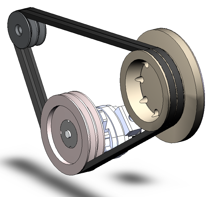 Keilriemen, V-Belt. Own work. 02. Nov. 2005. Borowski.